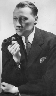 Karel Schulz (1899 - 1843), Český romanopisec, divadelní kritik a básník.